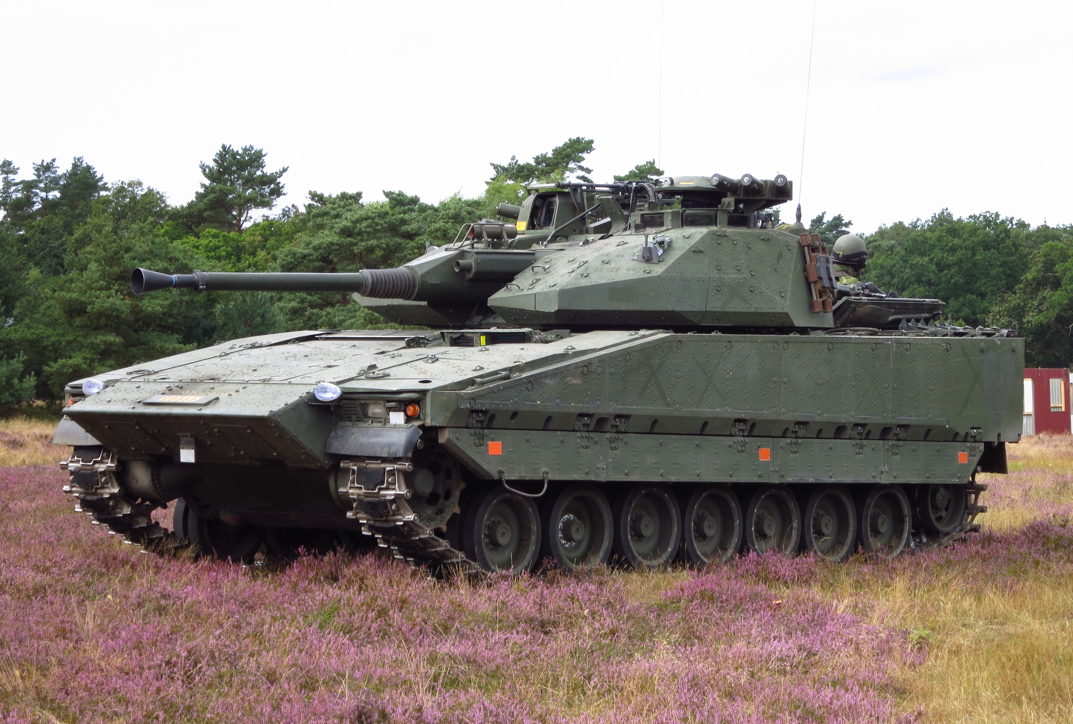 Stridsfordon 90 vid P7 Regementets dag 2012